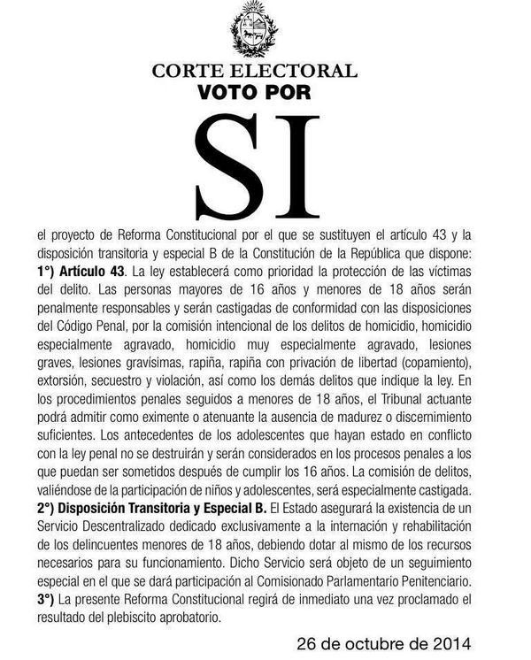 Bulletin de vote utilisé lors du référendum constitutionnel uruguayen de 2014